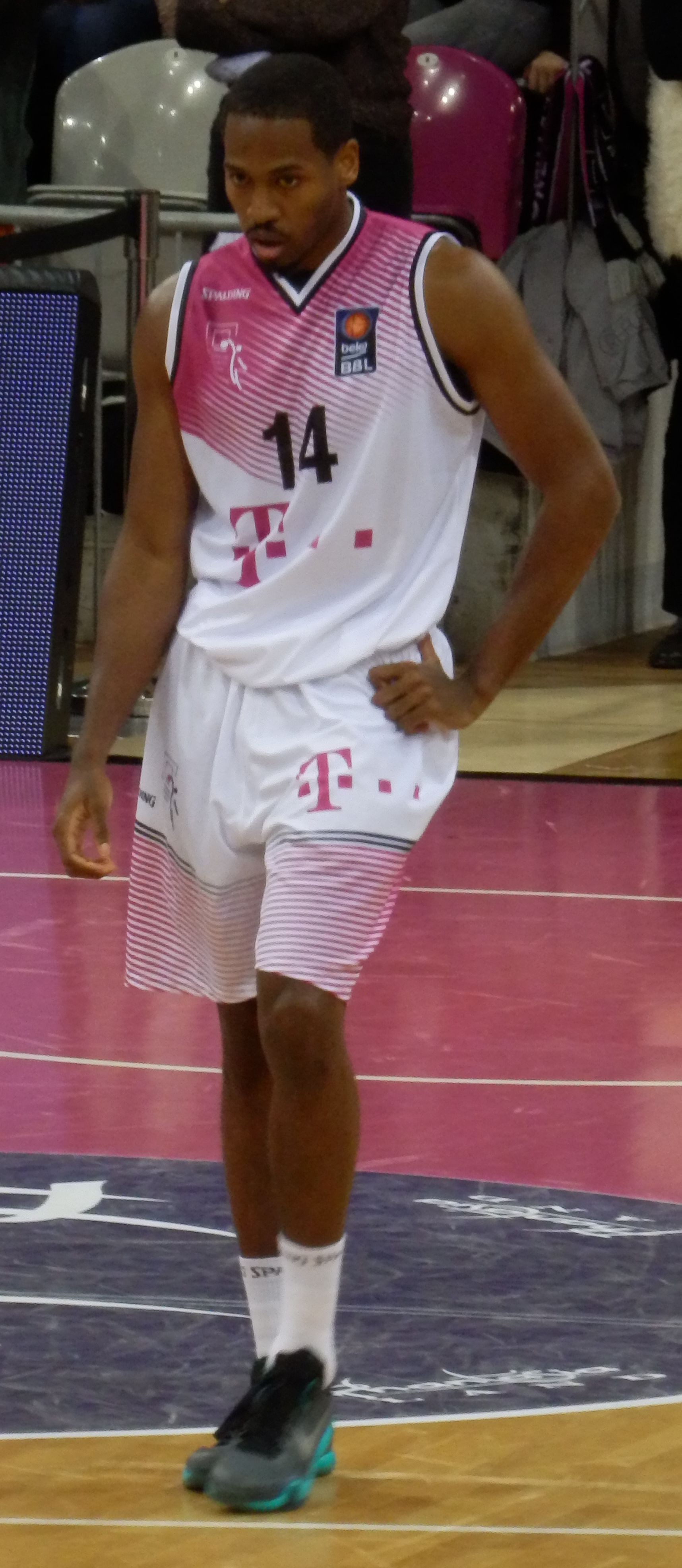 Langston Hall beim Spiel der Telekom Baskets Bonn gegen die Basketball Löwen Braunschweig am 20. Dezember 2015.